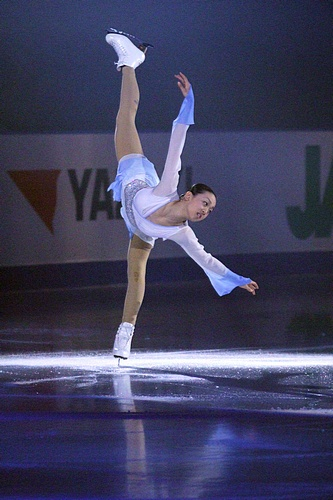 Ма́о Аса́да на 2011 NHK Trophy .